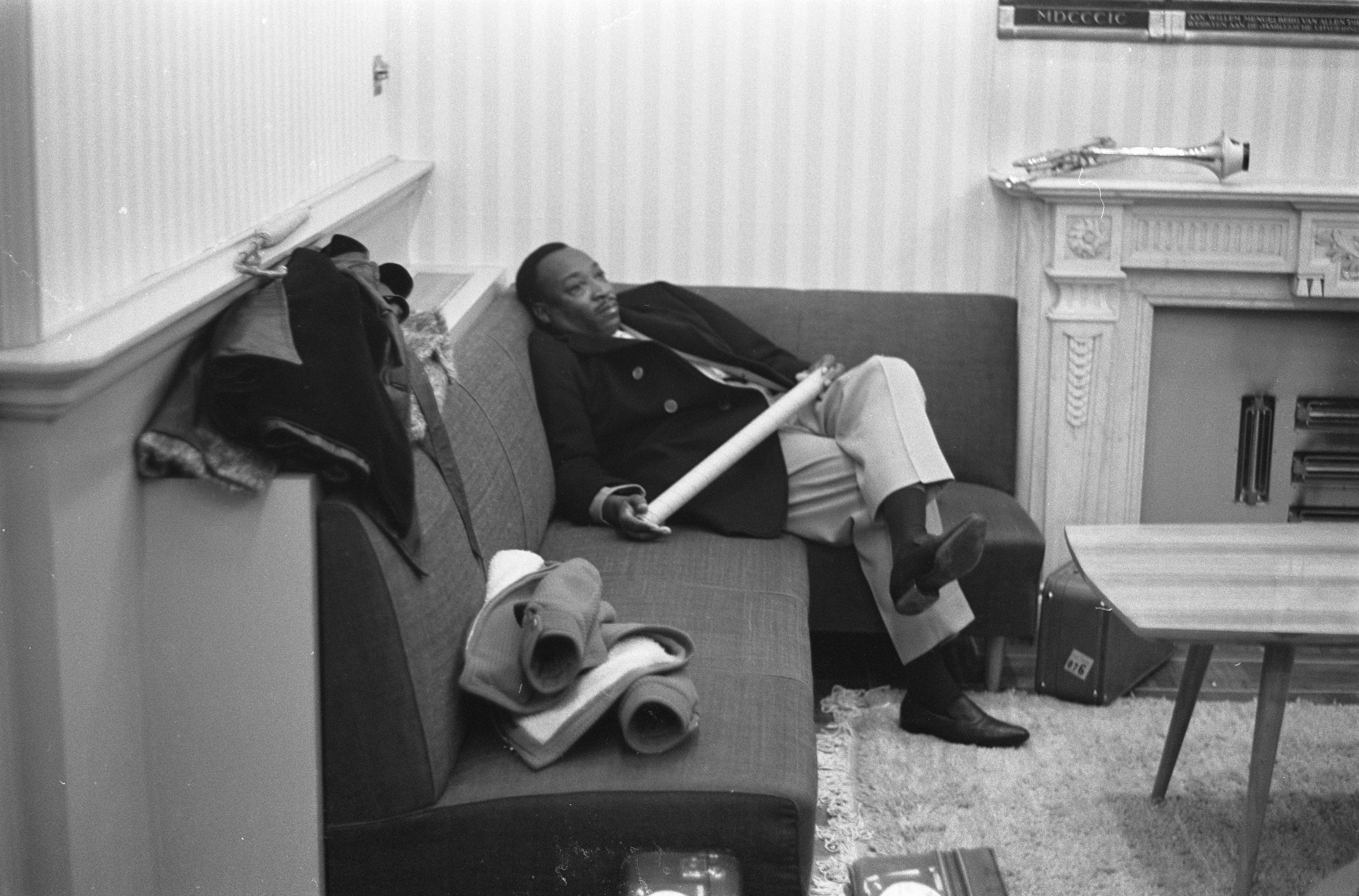 Collectie / Archief : Fotocollectie Anefo Reportage / Serie : [ onbekend ] Beschrijving : Dave Bartholomew in Amsterdam, Dave Bartholomew tijdens zijn optreden in het Concertgebouw Datum : 3 november 1962 Locatie : Amsterdam, Noord-Holland Trefwoorden : CONCERTGEBOUWEN, Optredens Persoonsnaam : Dave Bartholomew Fotograaf : Gelderen, Hugo van / Anefo Auteursrechthebbende : Nationaal Archief Materiaalsoort : Negatief (zwart/wit) Nummer archiefinventaris : bekijk toegang 2.24.01.05 Bestanddeelnummer : 914-4778 Reacties Geplaatst door Kees Bakker op 25 juli 2015 - 15:22. Dit is Fats Domino niet, dit is Dave Bartholomew (bandleider en trompettist)